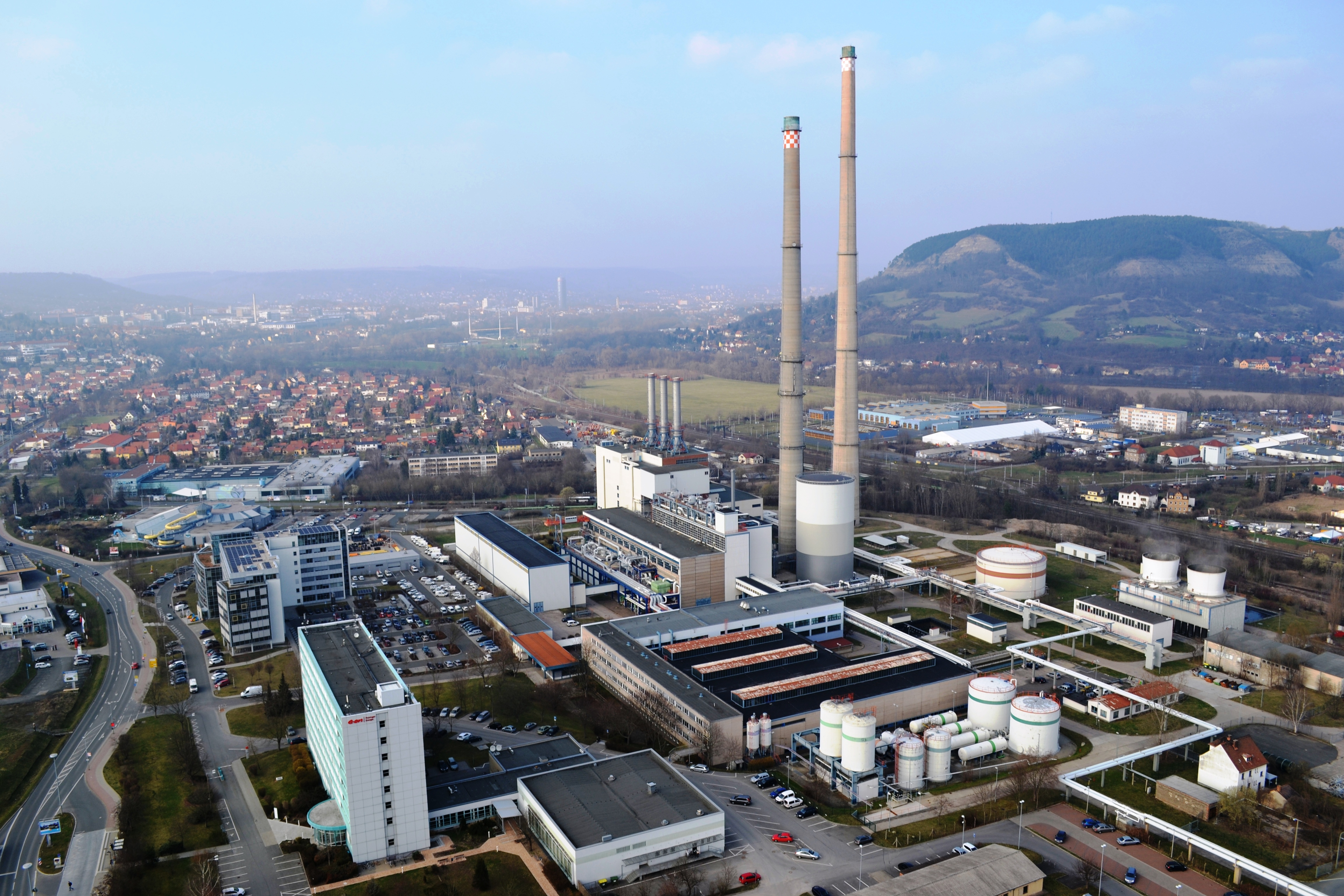 Luftbild des Heizkraftwerks Jena